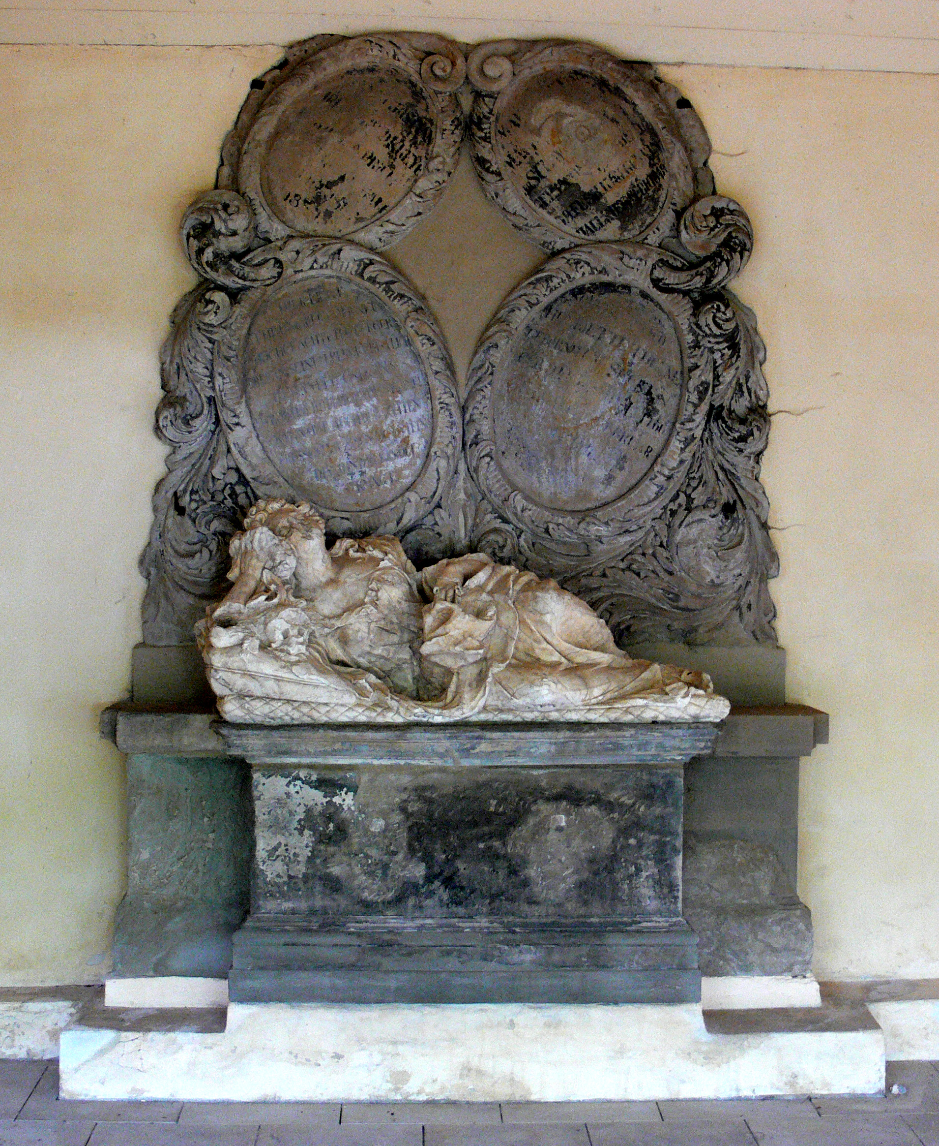 Stadtgottesacker, Epitaph im Bogen 48, Halle an der Saale